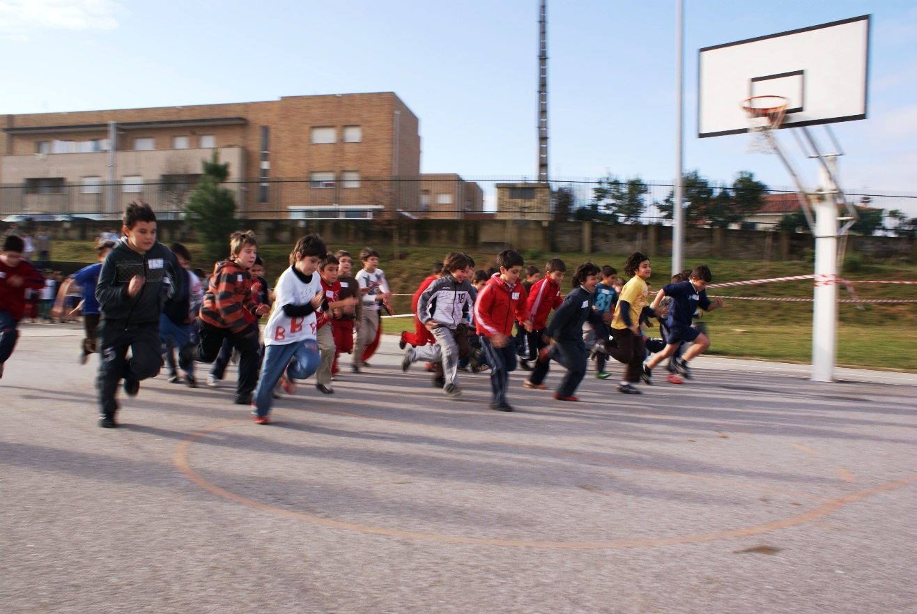 Corta-mato numa escola em Portugal (2008).